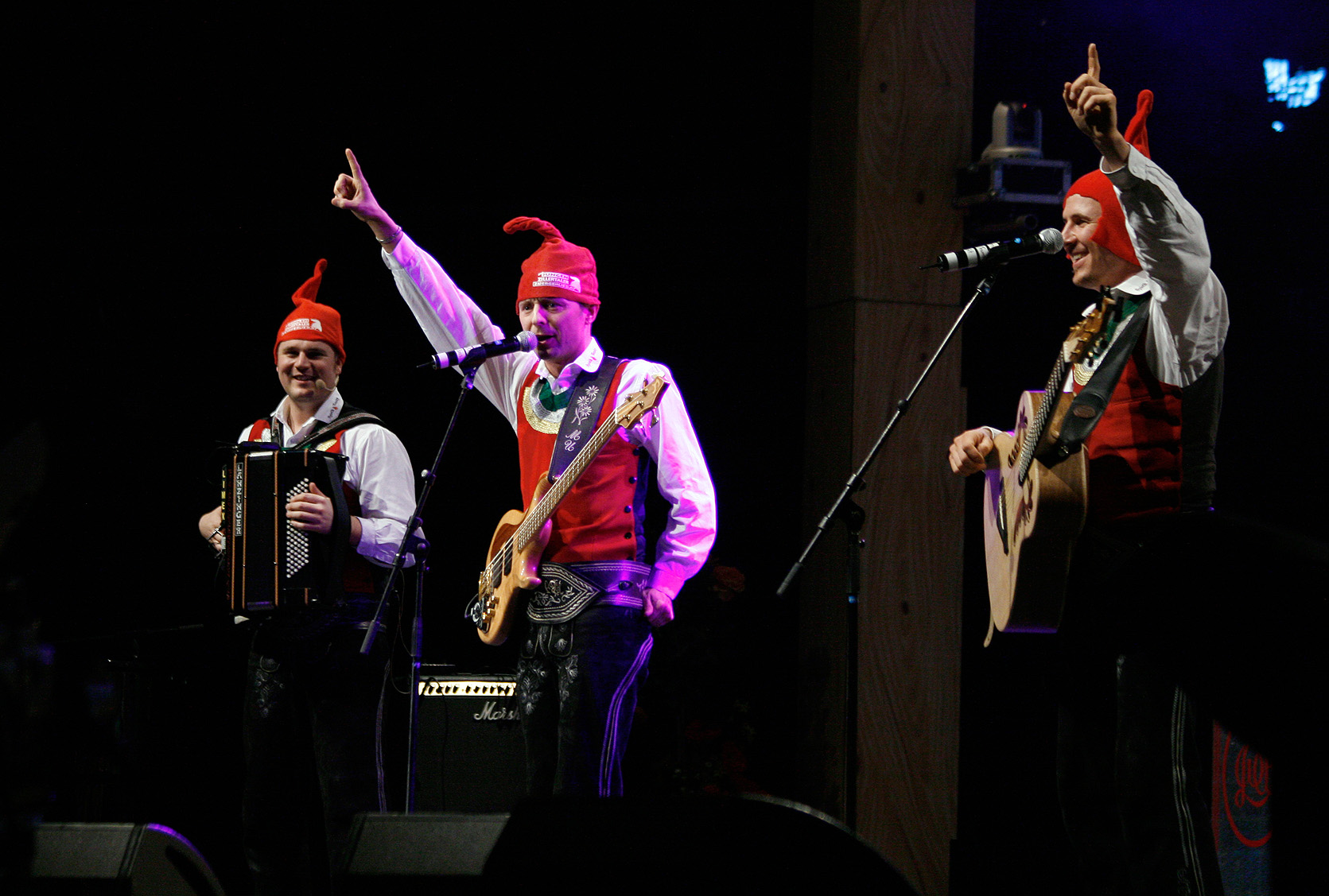 Die jungen Zillertaler mit der Musikantenstadl-Tournee in der Wiener Stadthalle.